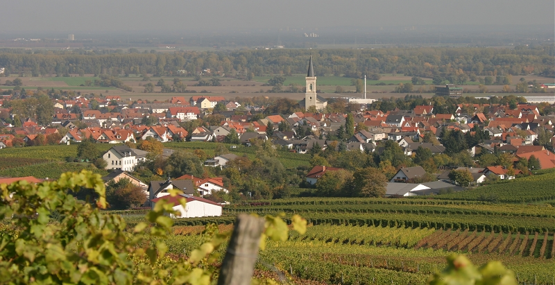 Bodenheim mit der Kirche St. Alban von den Weinbergen aus gesehen